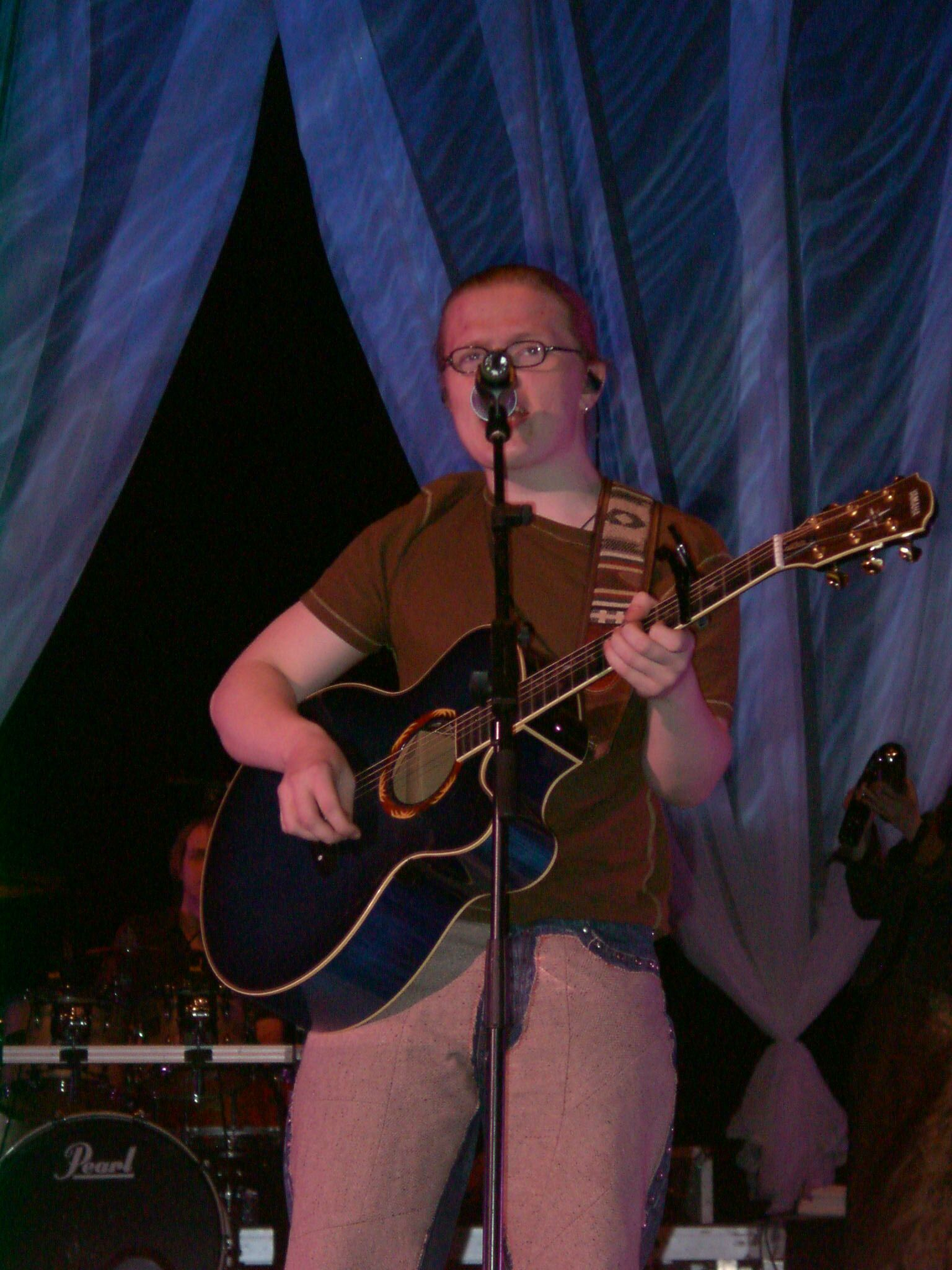 Angelo Kelly Münchenben (Olympiahalle)